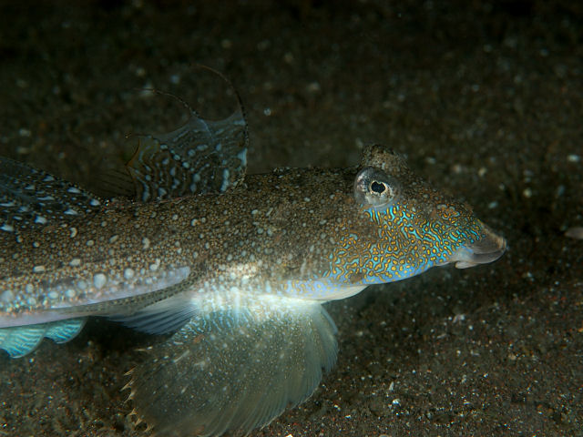 トビヌメリ Repomucenus beniteguri